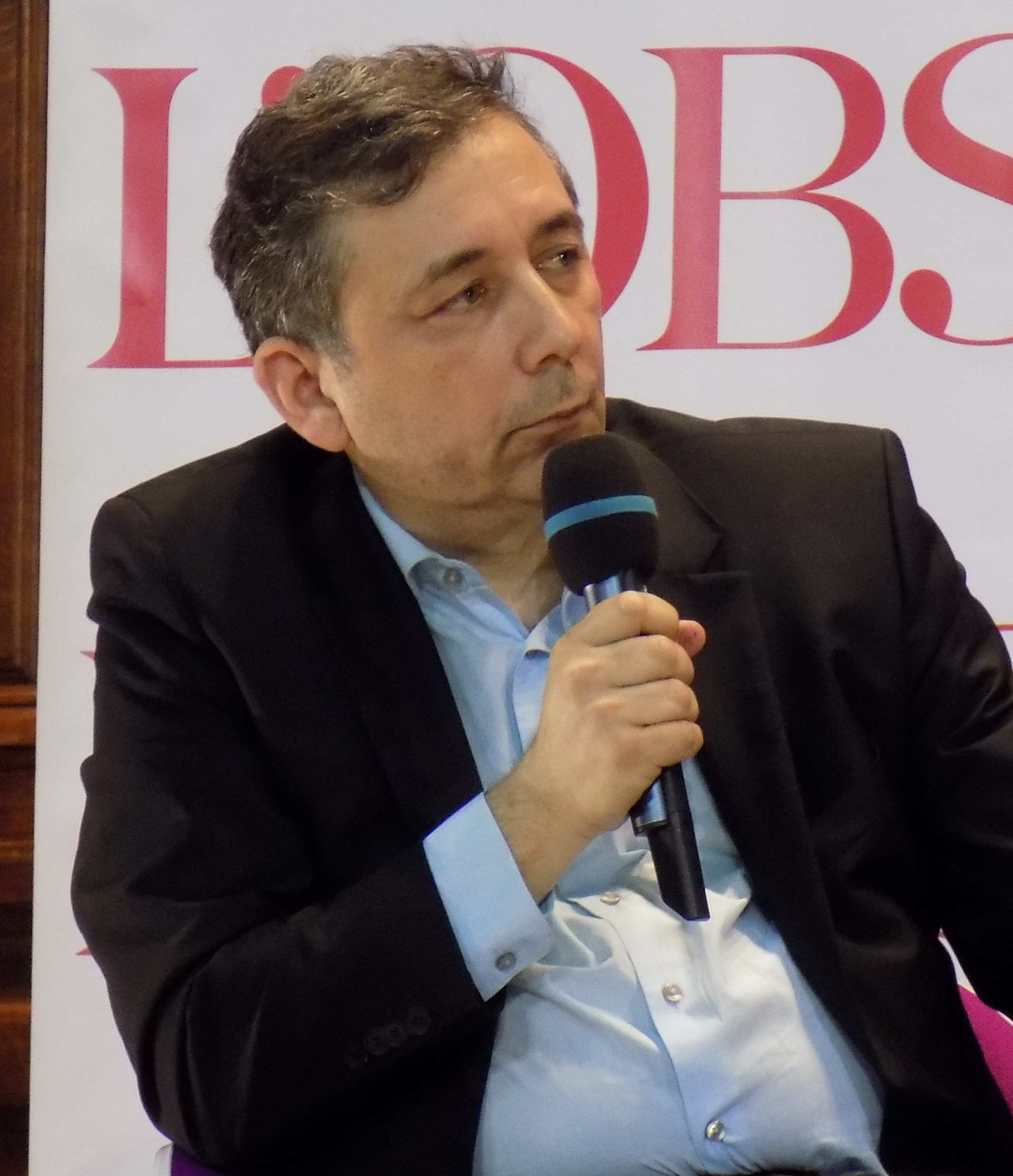 Gilles Pécout lors du forum « L’année vue par l’histoire » organisé par France Culture le 25 avril 2015